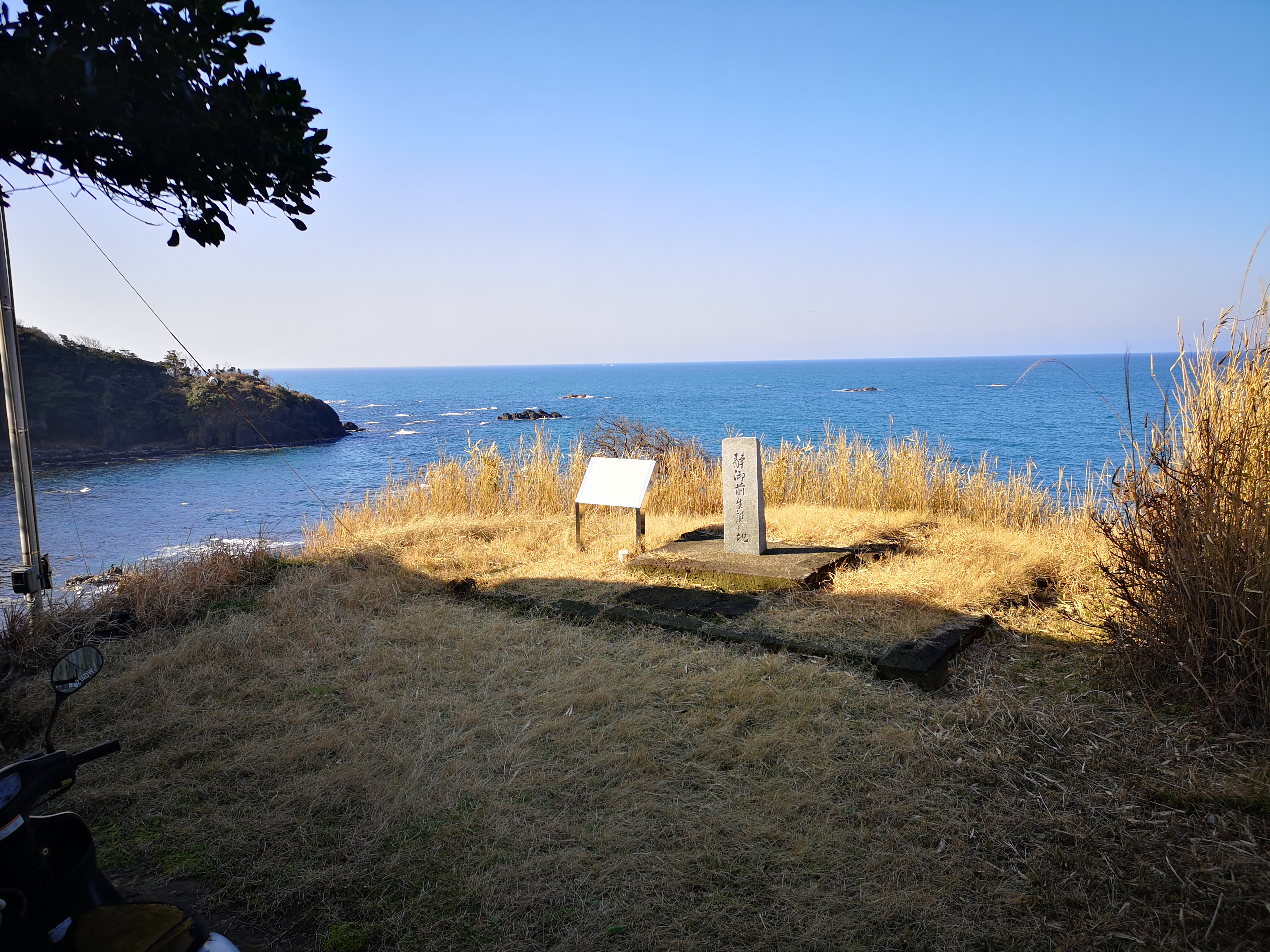 京丹後市網野町磯にある静御前の生誕地